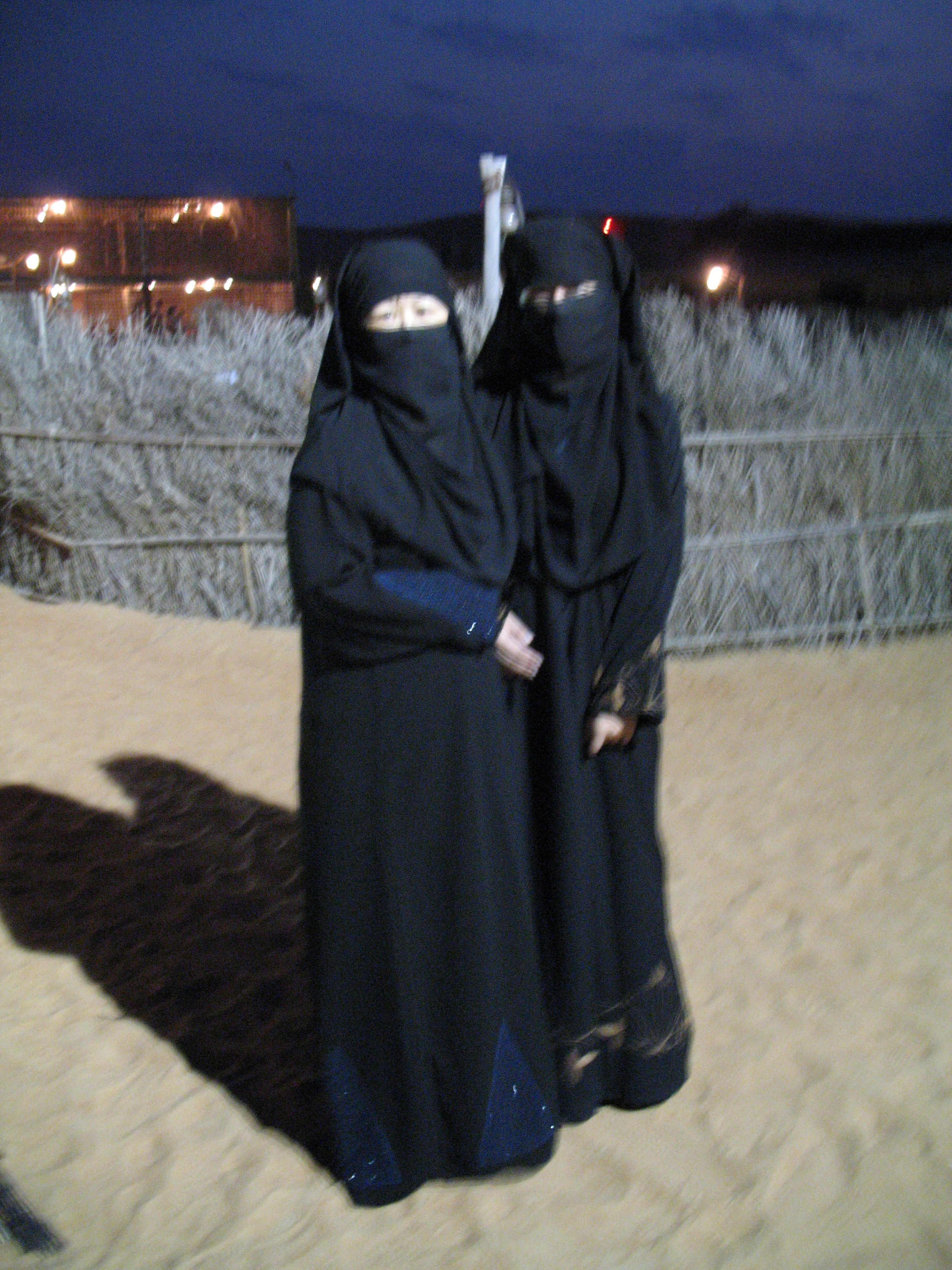 Two women dressed in nikab.